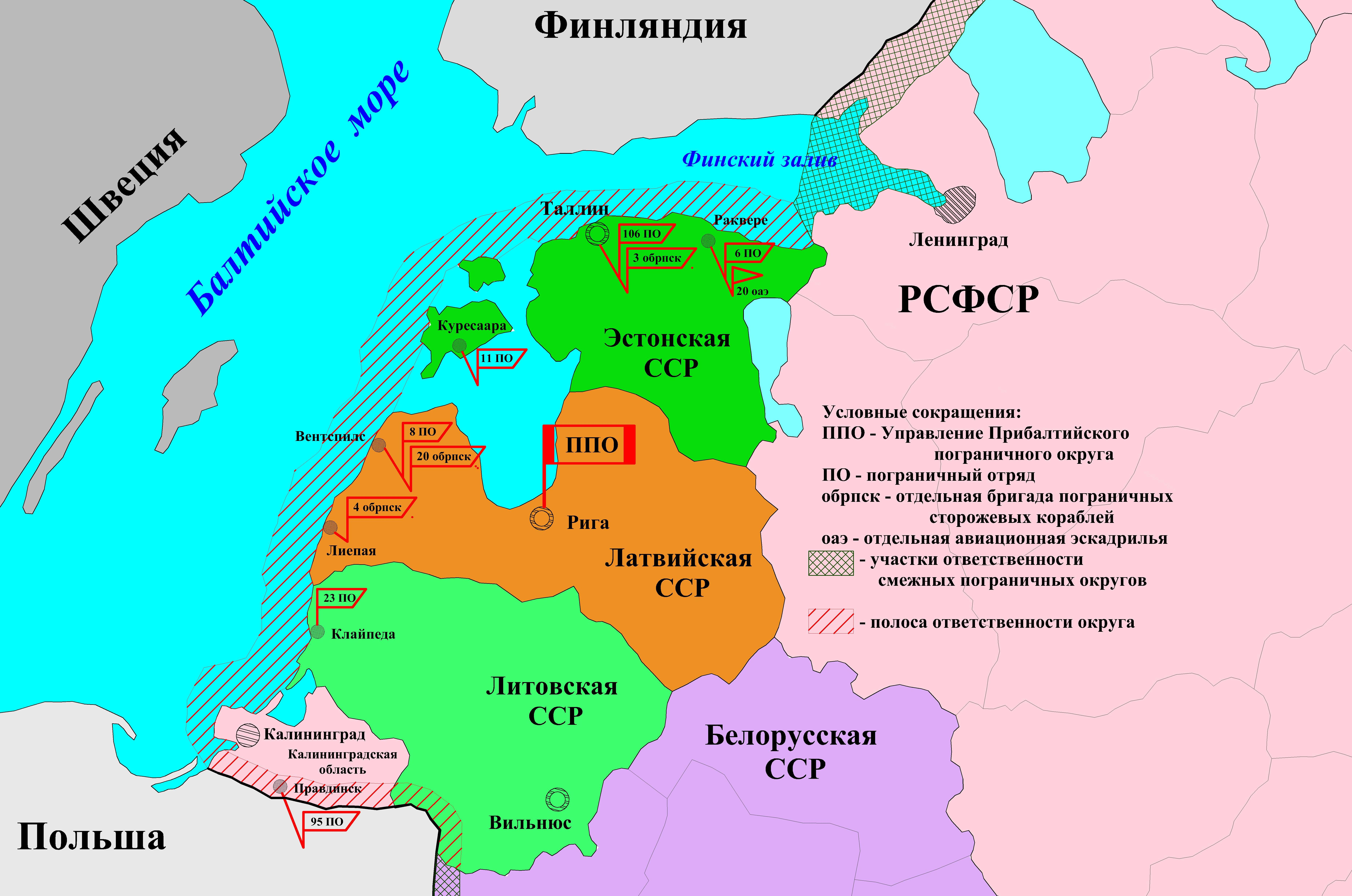 Прибалтийский пограничный округ КГБ СССР на 1991 год. Расположение отрядов. Данные взяты из этого источника